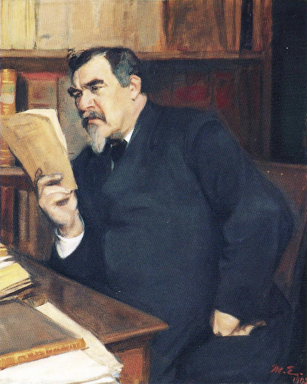 Helsingin yliopiston vt. sijaiskansleri Thiodolf Rein (1838–1919). Magnus Enckell toteutti muotokuvan vuosina 1900–1902 ja yliopisto osti sen jälkeenpäin kokoelmiinsa.